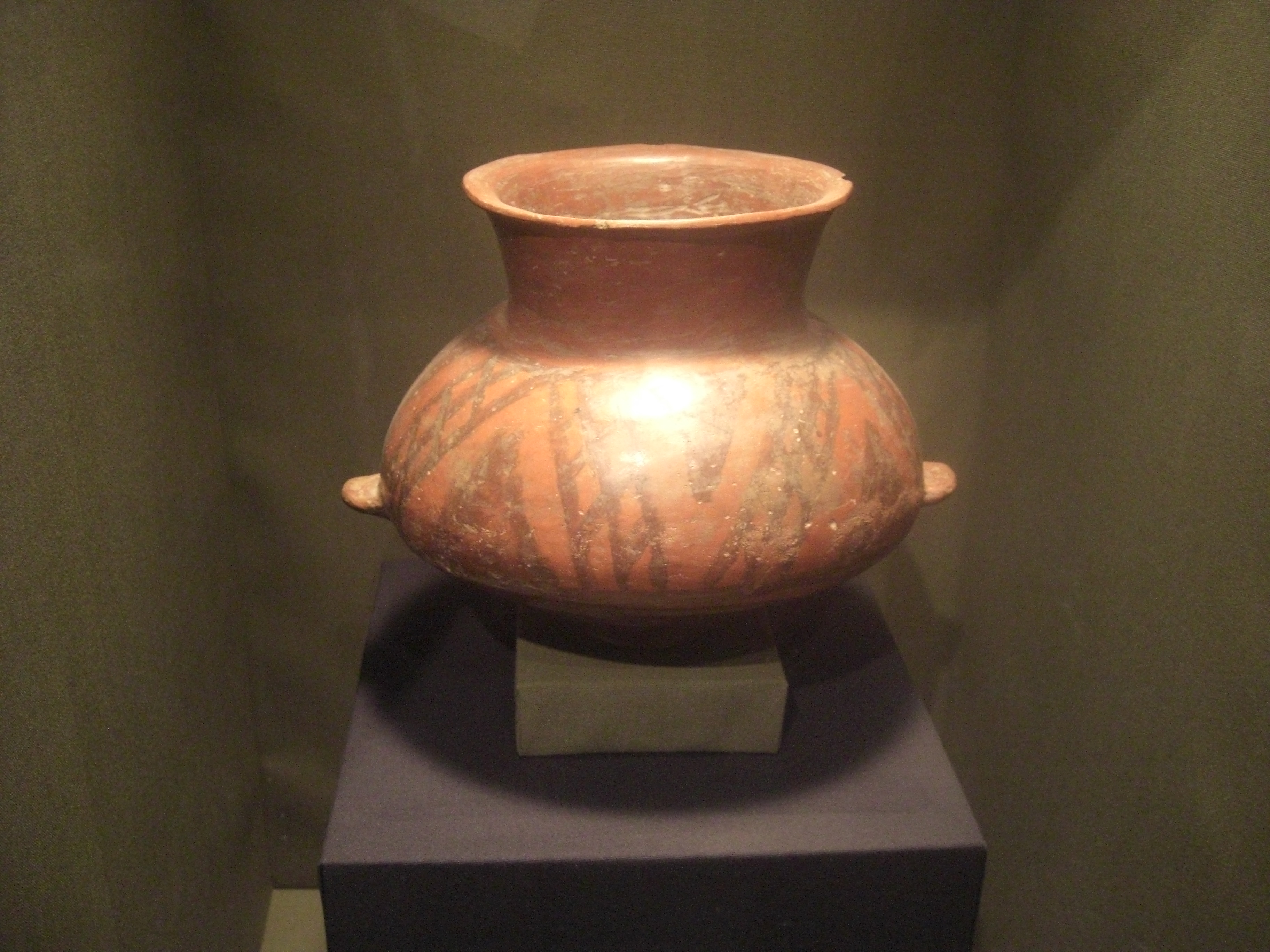 Vasija, Andalgalá, Catamarca, Argentina. Estilo Famabalasto ( a partir del s. XII d.c.) Museo de la Plata